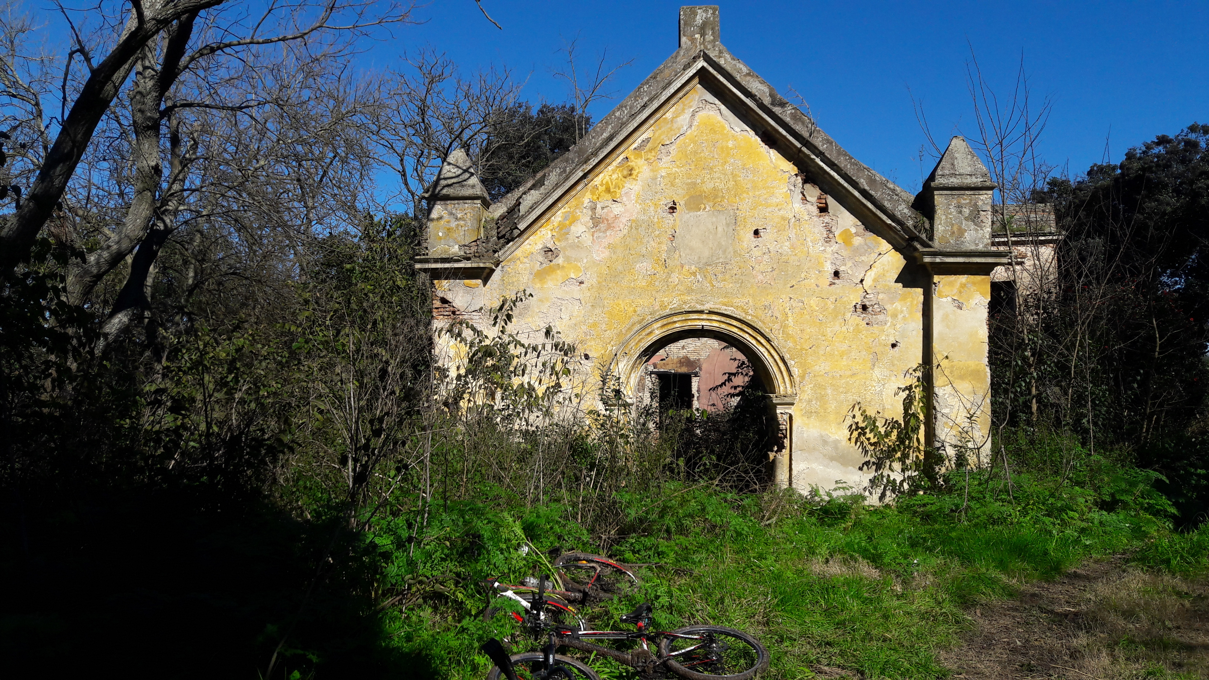 La Capilla, Buenos Aires, Argentina